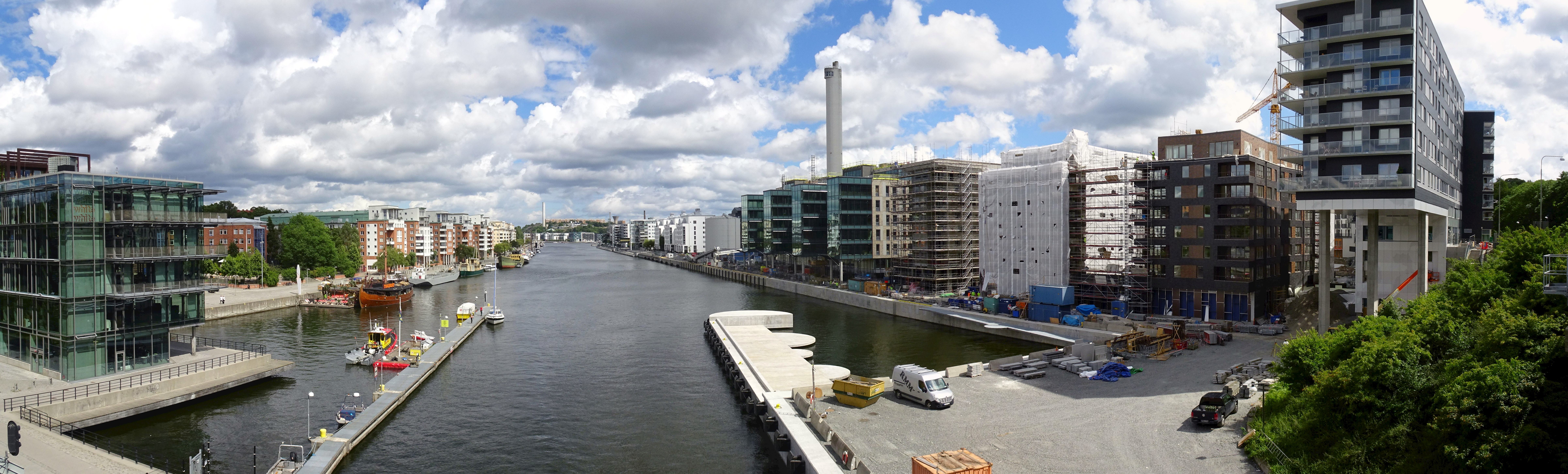 Panorama över Hammarbyhamnen från Skansbron